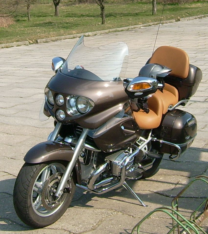 BMW R 1200 CL